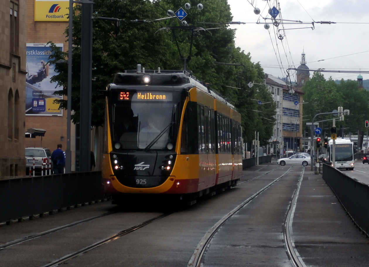 ET2010 925 (9480 0450 925-3) der AVG in Heilbronn bei Durchfahrt des Stromsystemwechsels nahe Heilbronn Hauptbahnhof/Willy-Brandt-Platz.